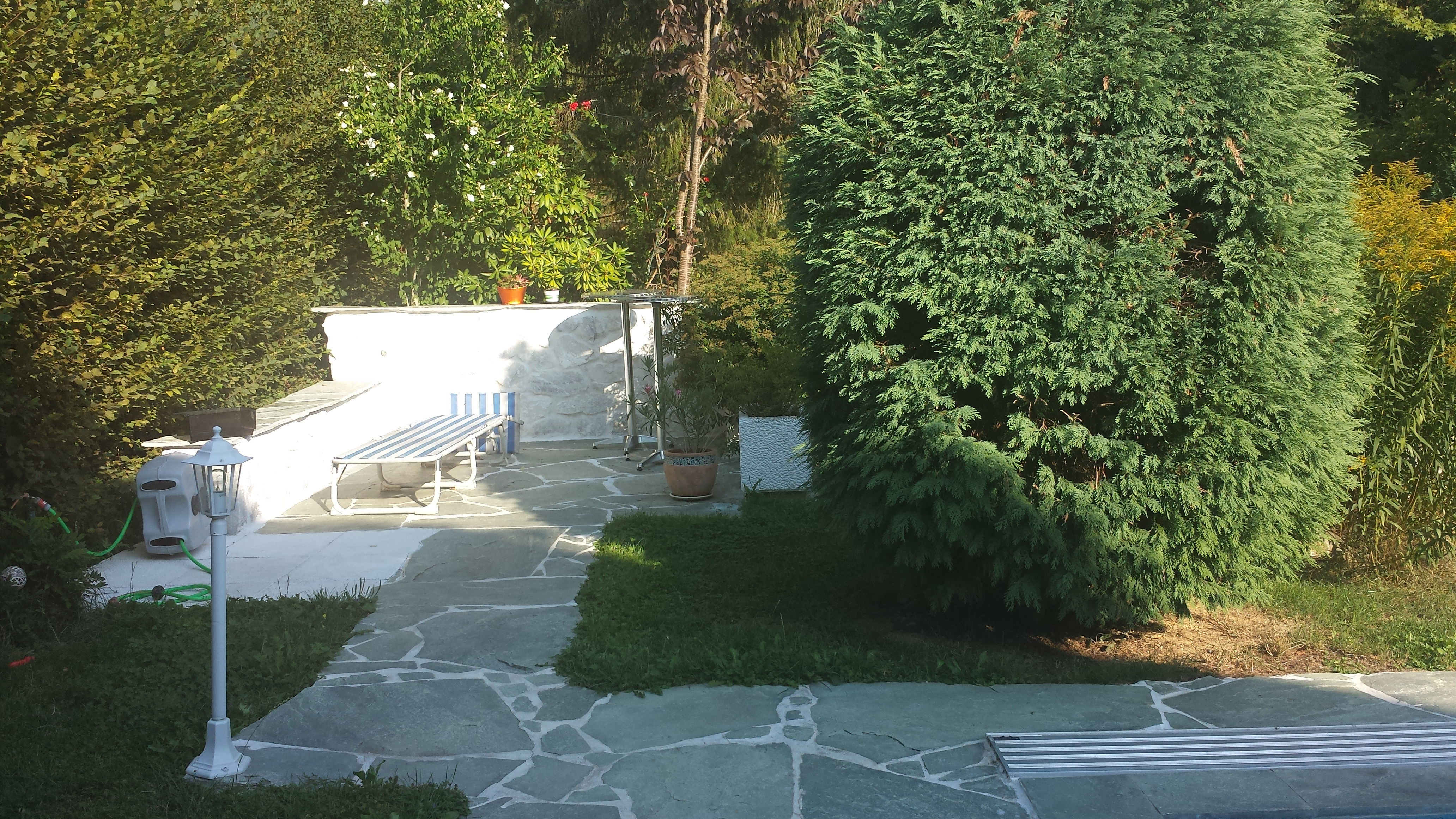 Aussengestaltung Boden- und Abdeckplatten mit dem grünen St. Niklauser Quarzit aus dem Nikolaital